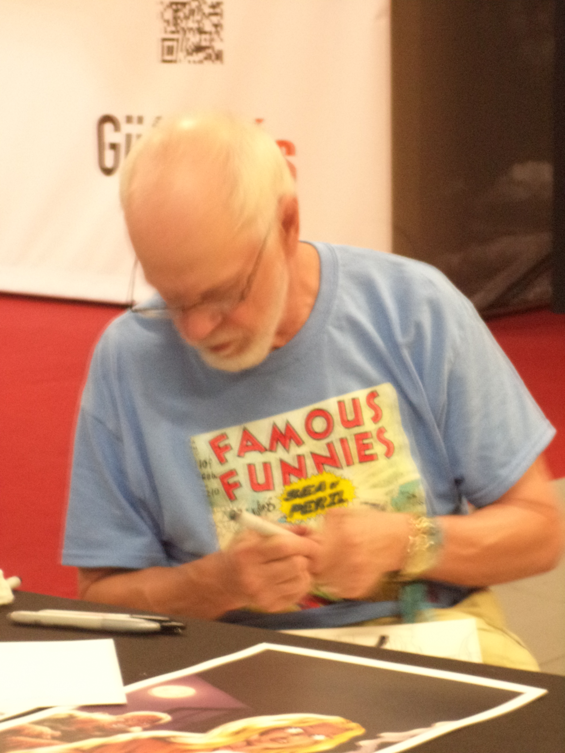 Bob Hall in Xixón. 2014